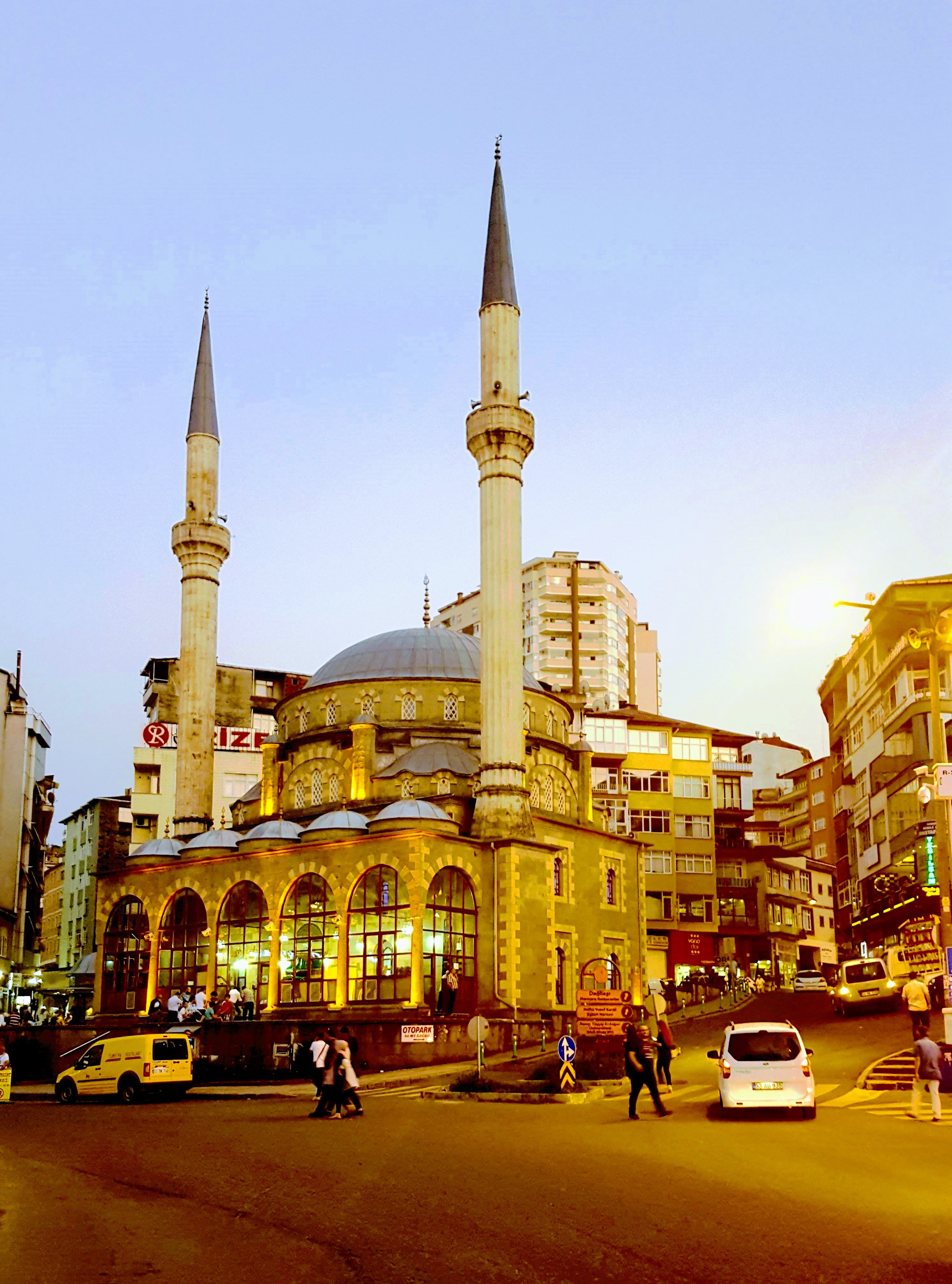 შეიხის მეჩეთი, რიზე